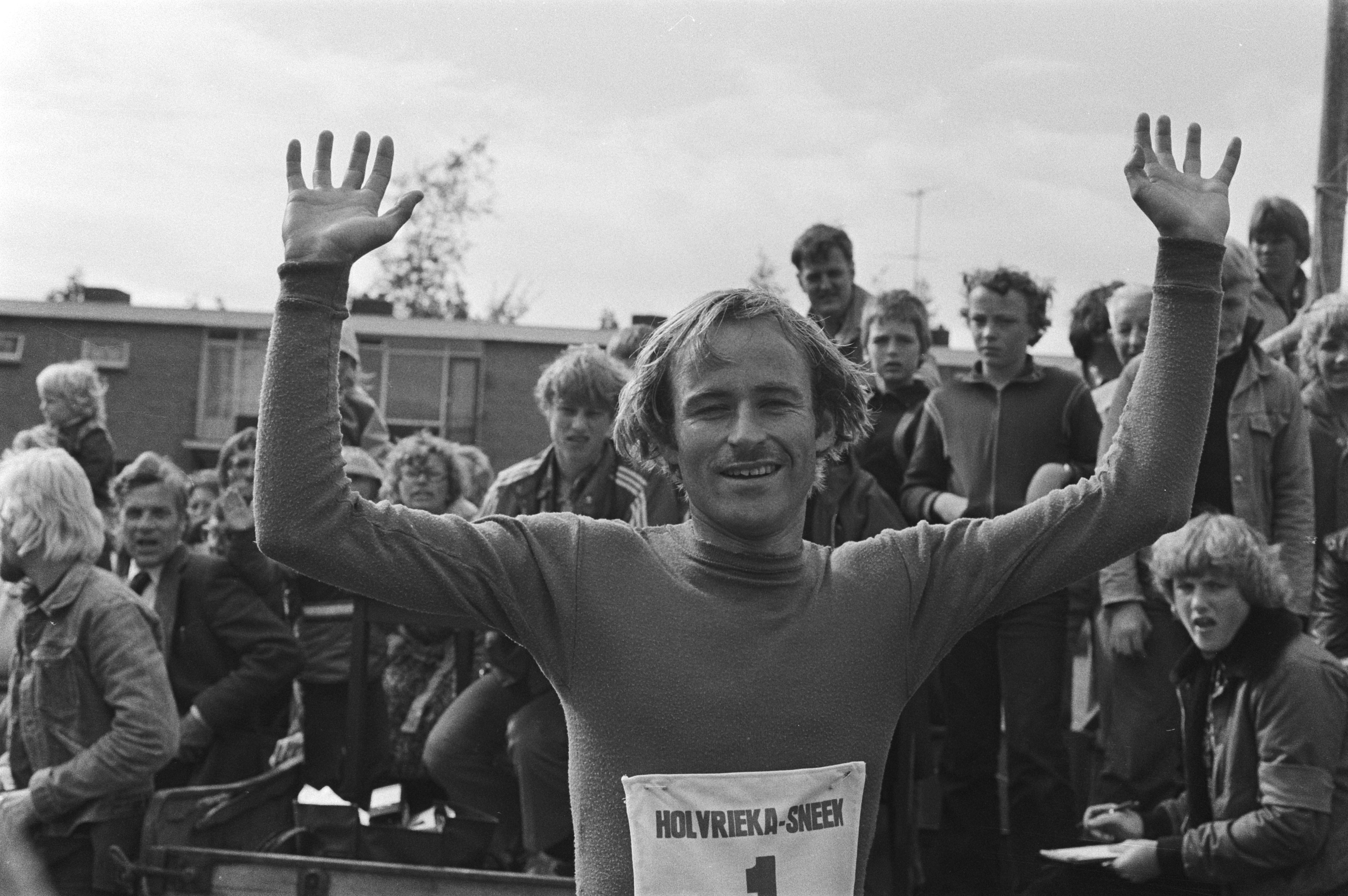 Collectie / Archief : Fotocollectie Anefo Reportage / Serie : [ onbekend ] Beschrijving : Nederlandse kampioenschappen marathon, Sneek; winnaar de Noor Fjaerstad Datum : 10 juni 1978 Locatie : Friesland, Sneek Trefwoorden : KAMPIOENSCHAPPEN, MARATHONS, Winnaars Fotograaf : Peters, Hans / Anefo Auteursrechthebbende : Nationaal Archief Materiaalsoort : Negatief (zwart/wit) Nummer archiefinventaris : bekijk toegang 2.24.01.05 Bestanddeelnummer : 929-7667